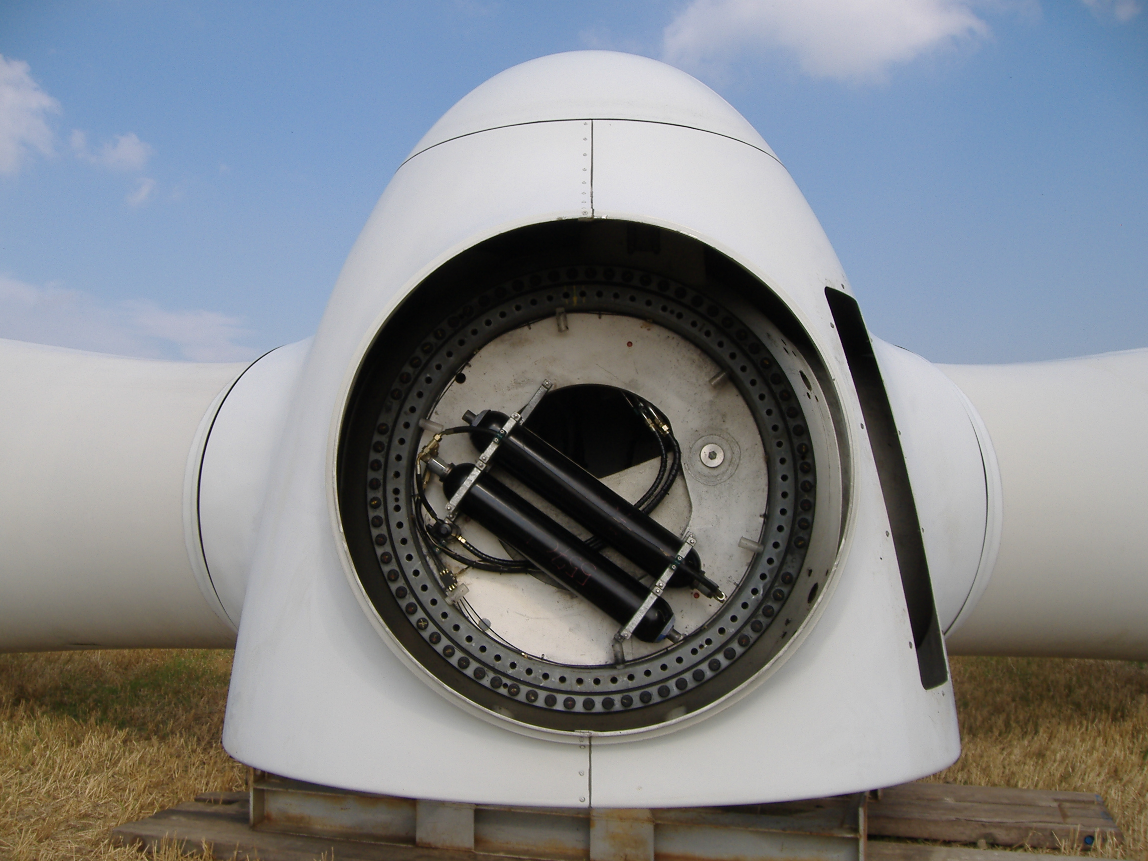 Blick auf die Funktionseinheit, an der ein Rotorblatt fixiert wird